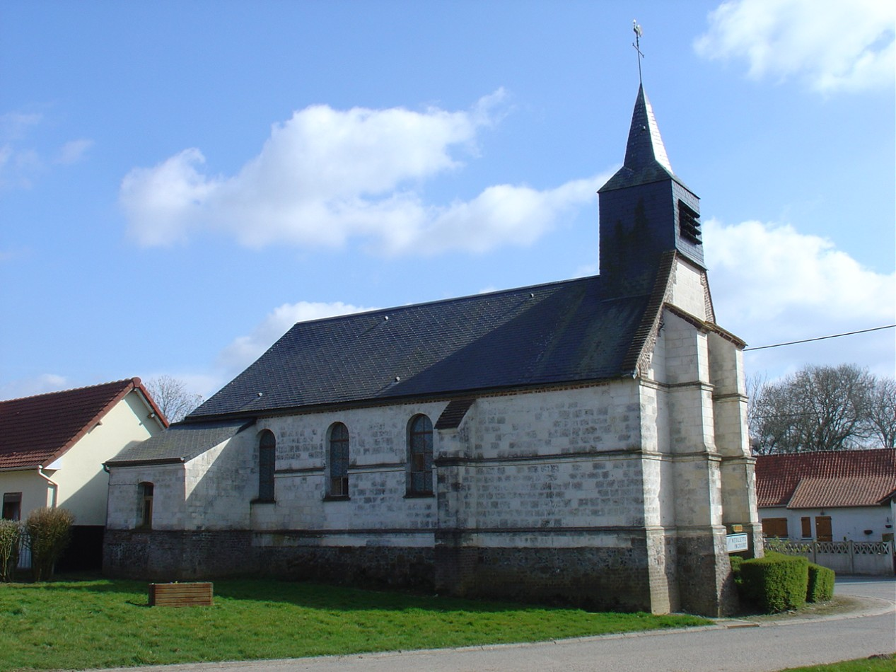 Église de Noyelles-lès-Humières